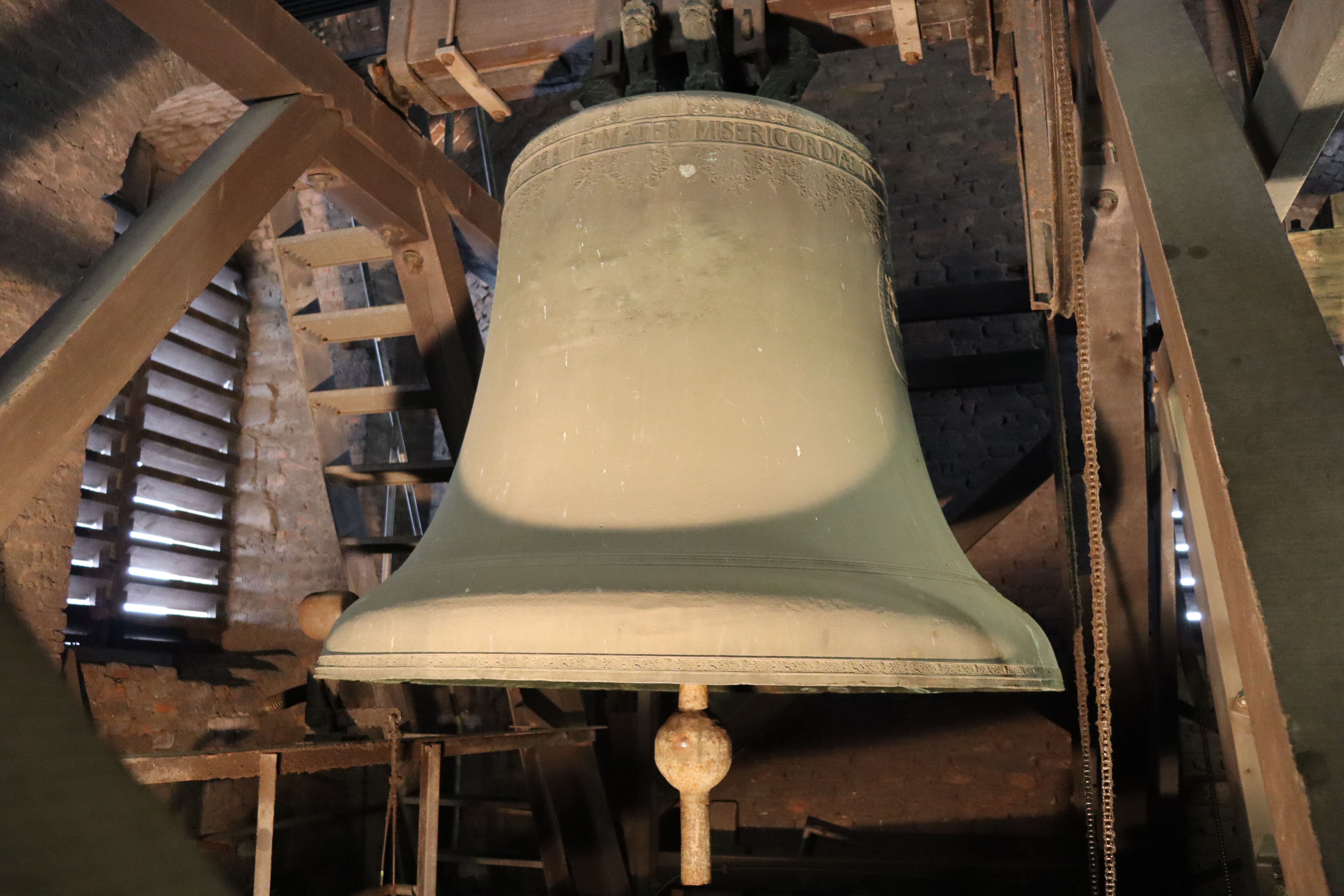 Die große Glocke der Maria-Himmelfahrt-Kirche am Hbf Köln.